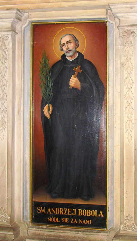 Obraz św. Andrzeja Boboli w kościele śś. Apostołów Piotra i Pawła w Kamiennej Górze